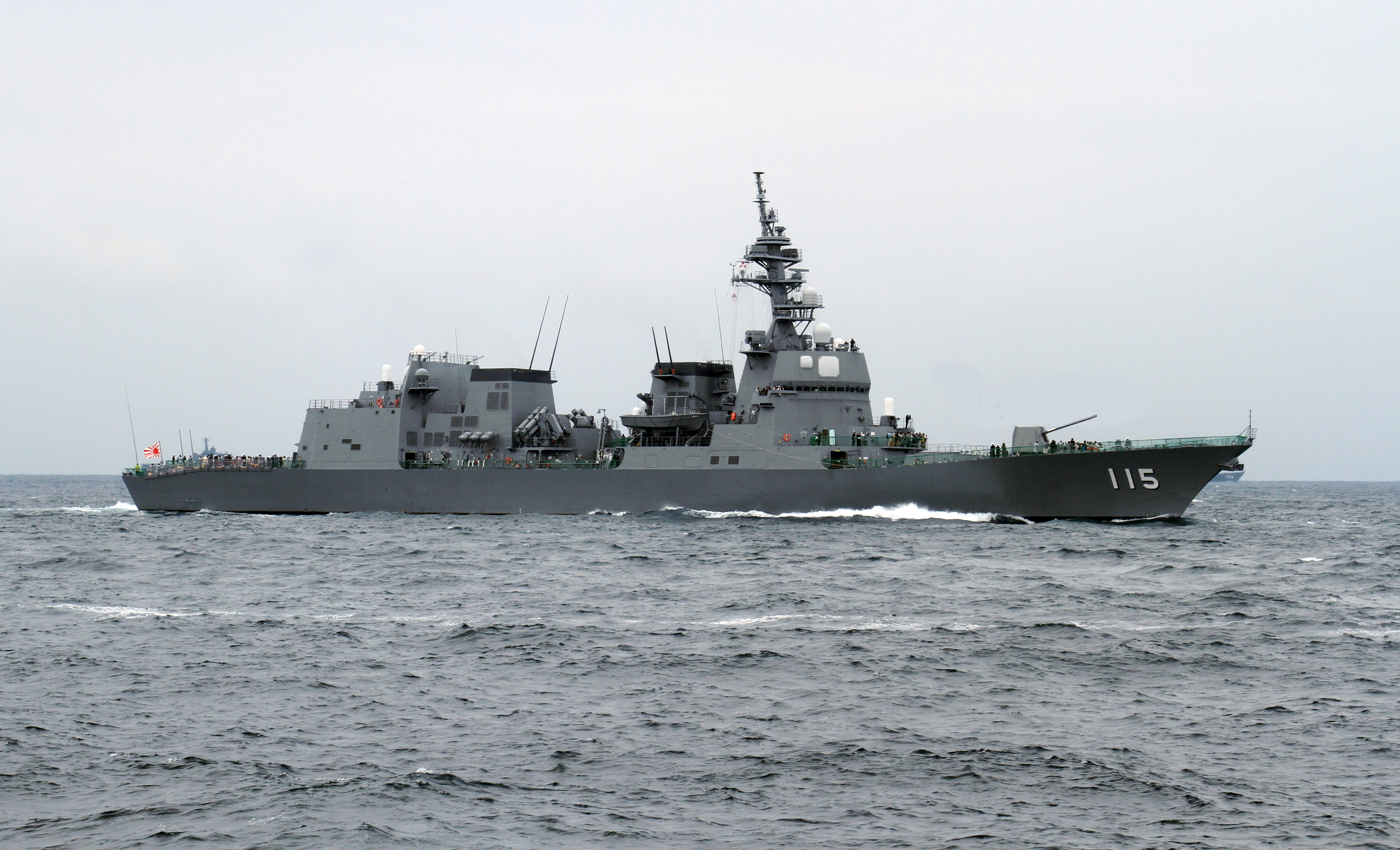 平成24年度観艦式の訓練展示で相模湾を航行する護衛艦あきづき。